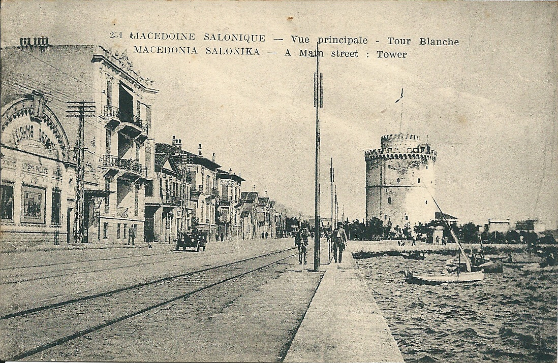 Salonique - Rue principale & Tour blanche - vers 1918